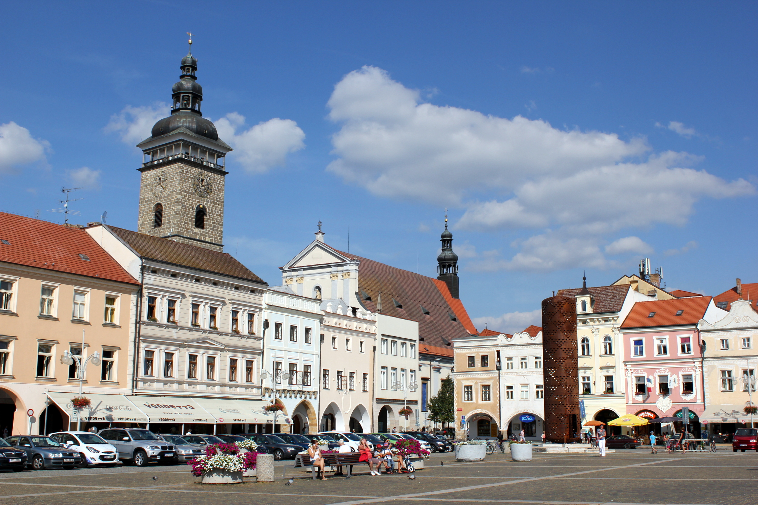 Marktplatz in Budweis, Tschechien.Hornjoserbsce: Torhošćo w Budźejowicach, Čěska.